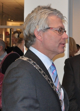 Ferd Crone (PvdA), burgemeester van Leeuwarden